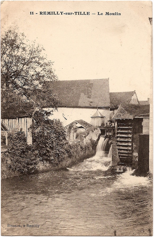 Carte postale du moulin vers 1920.